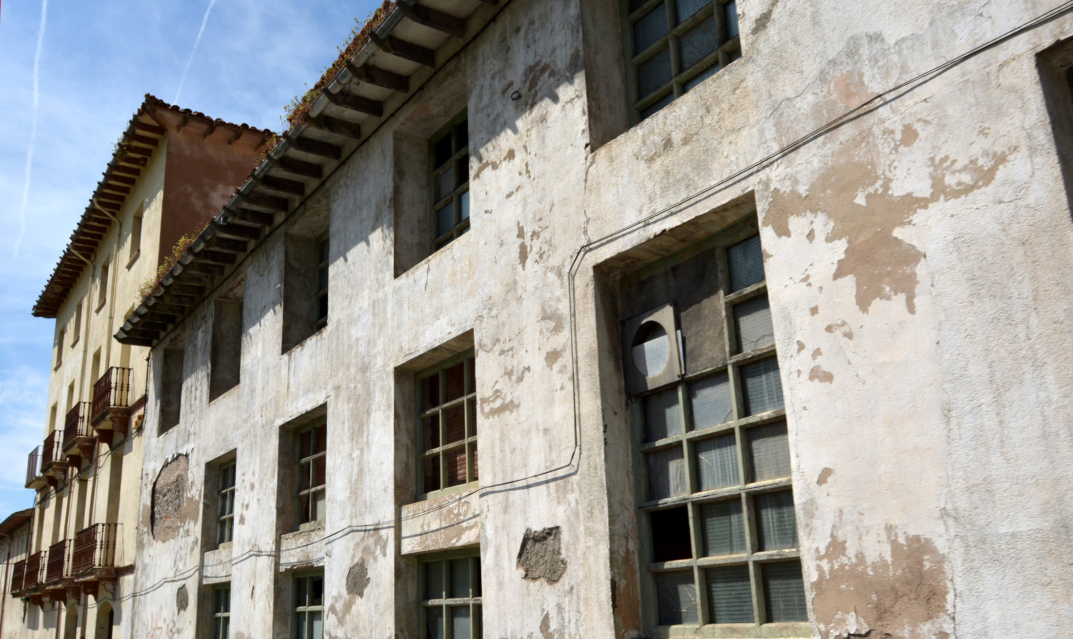 Colònia l'Herand, antiga colonia textil del municipio de Campdevànol (Ripollès), incluida en el inventario del "Patrimoni Arquitectònic de Catalunya", situada en la margen izquierda del río Freser.